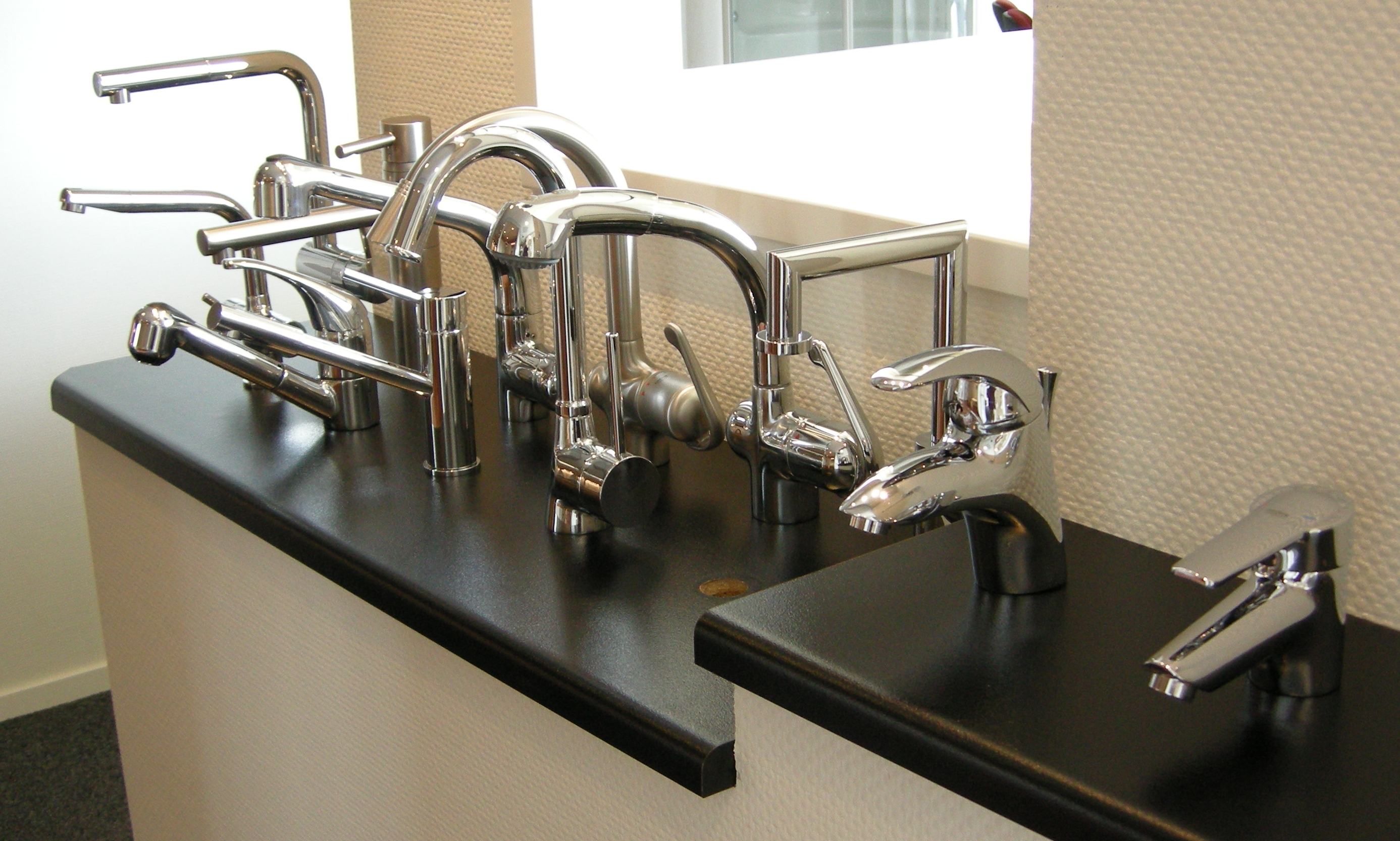 Een assortiment mengkranen